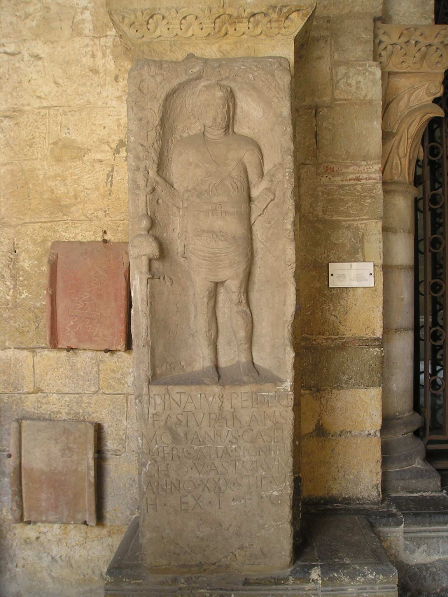 Copia de la Inscricpción (CIL XIII, 8098) de Bonna (Bon, Alemania), realizada para el Museo de la real Colegita de San Isidoro de León, cuyo texto reza: PINTAIVS PEDILICI/ F(ilius) ASTVR TRANS/MONTANVS CASTEL(lo)/ INTERCATIA SIGNIFER/ C(o)HO(ortis) V ASTVRVM/ ANNO(rum) XXX STIP(endiorum) VII/ H(eres) EX T(estamento) F(aciendum) C(uravit)